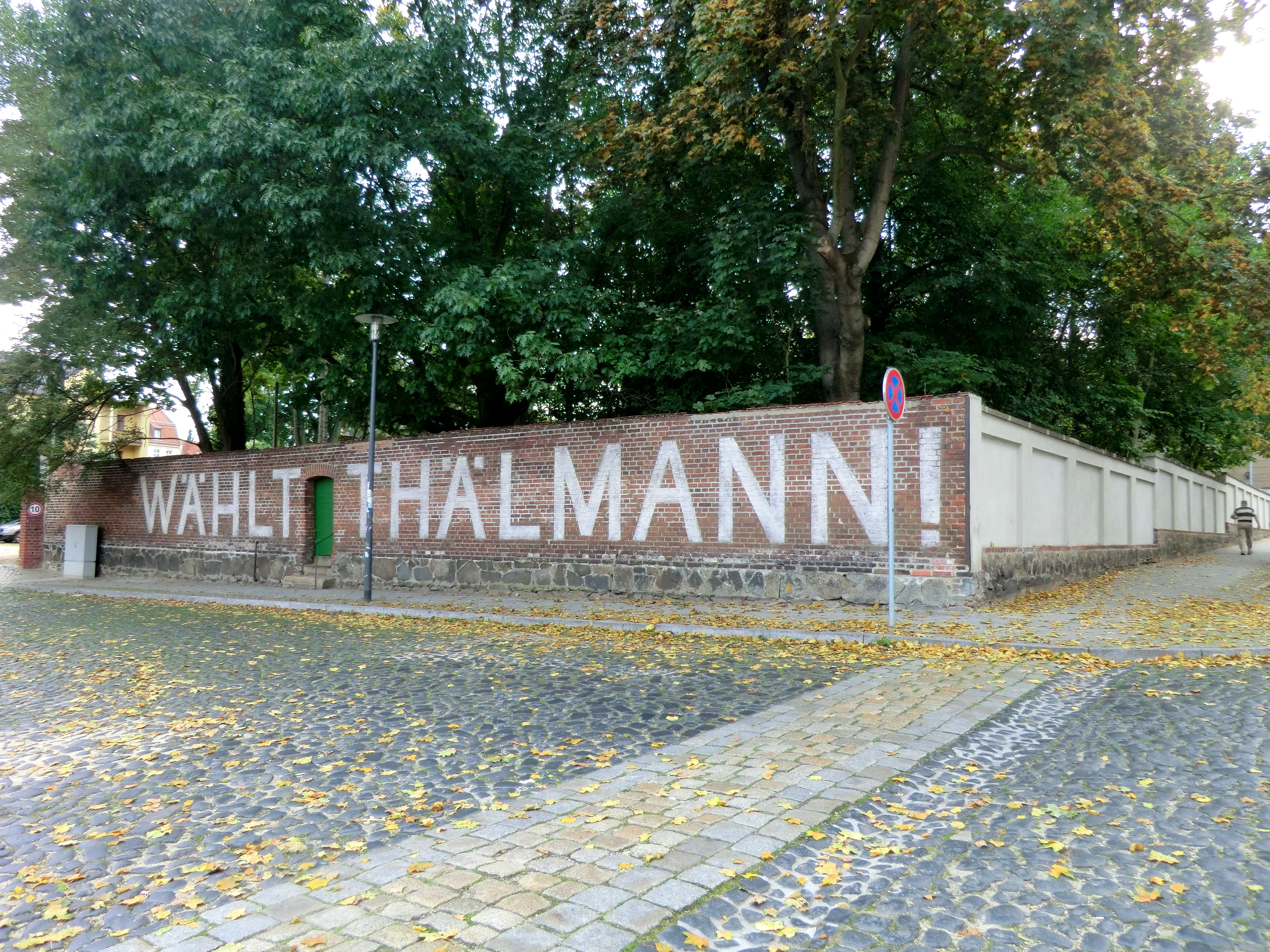 Wählt Thälmann! Schriftzug Görlitz Bergstraße (2014)